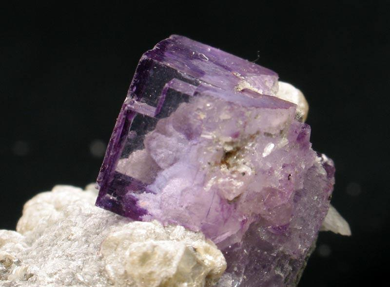 fluoryt i kalcyt, pochodzenie Chiny, autor zdjęcia Stowarzyszenie Spirifer